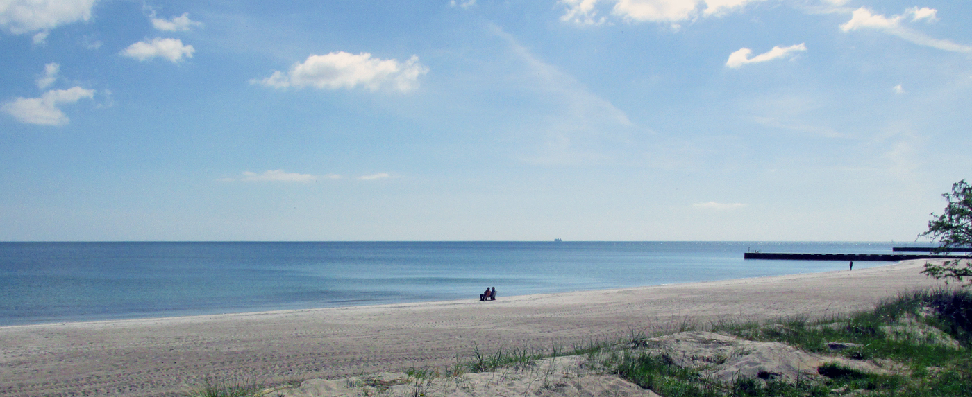 Ystad Saltsjöbad 16 maj 2014.